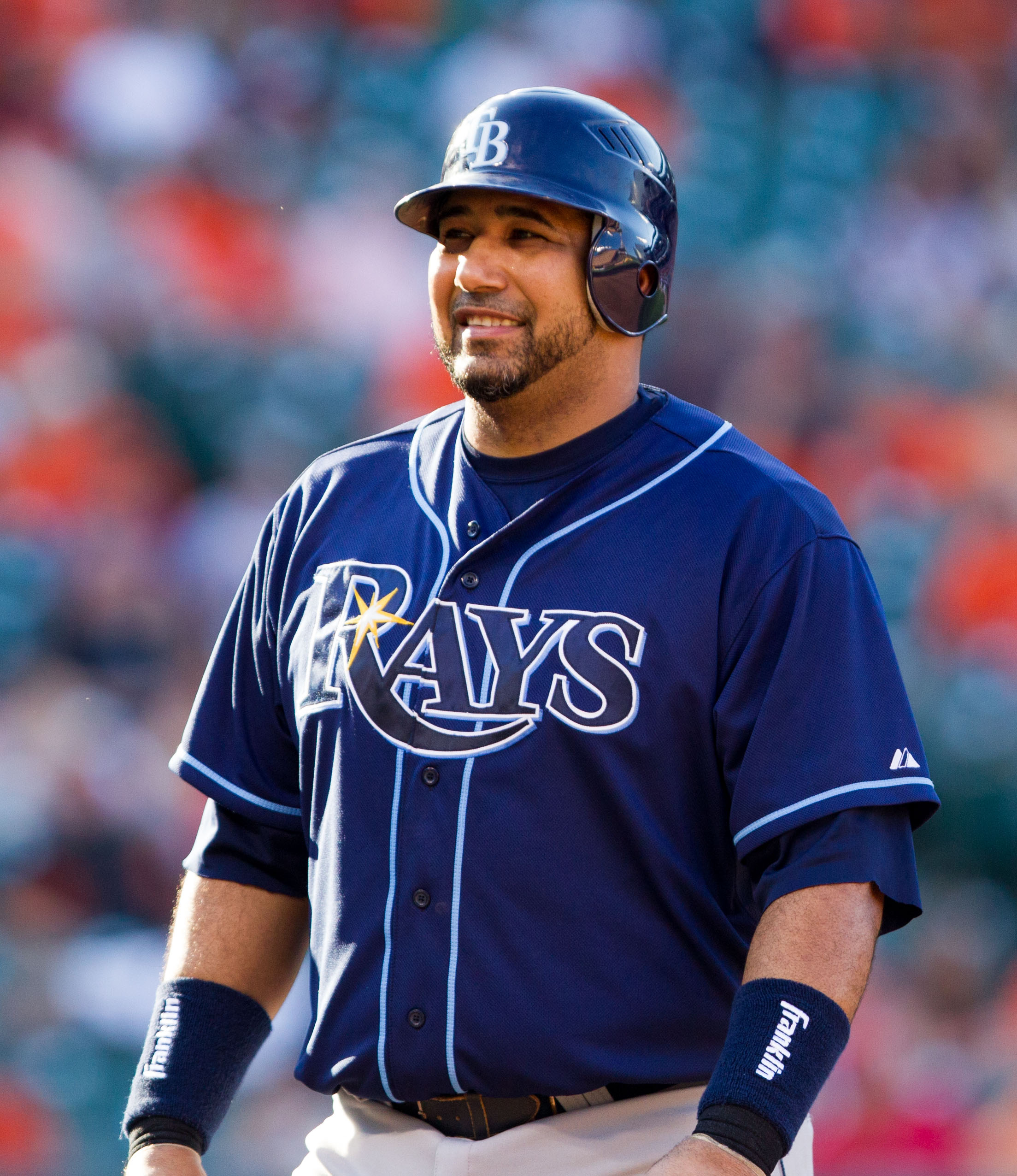 José Molina